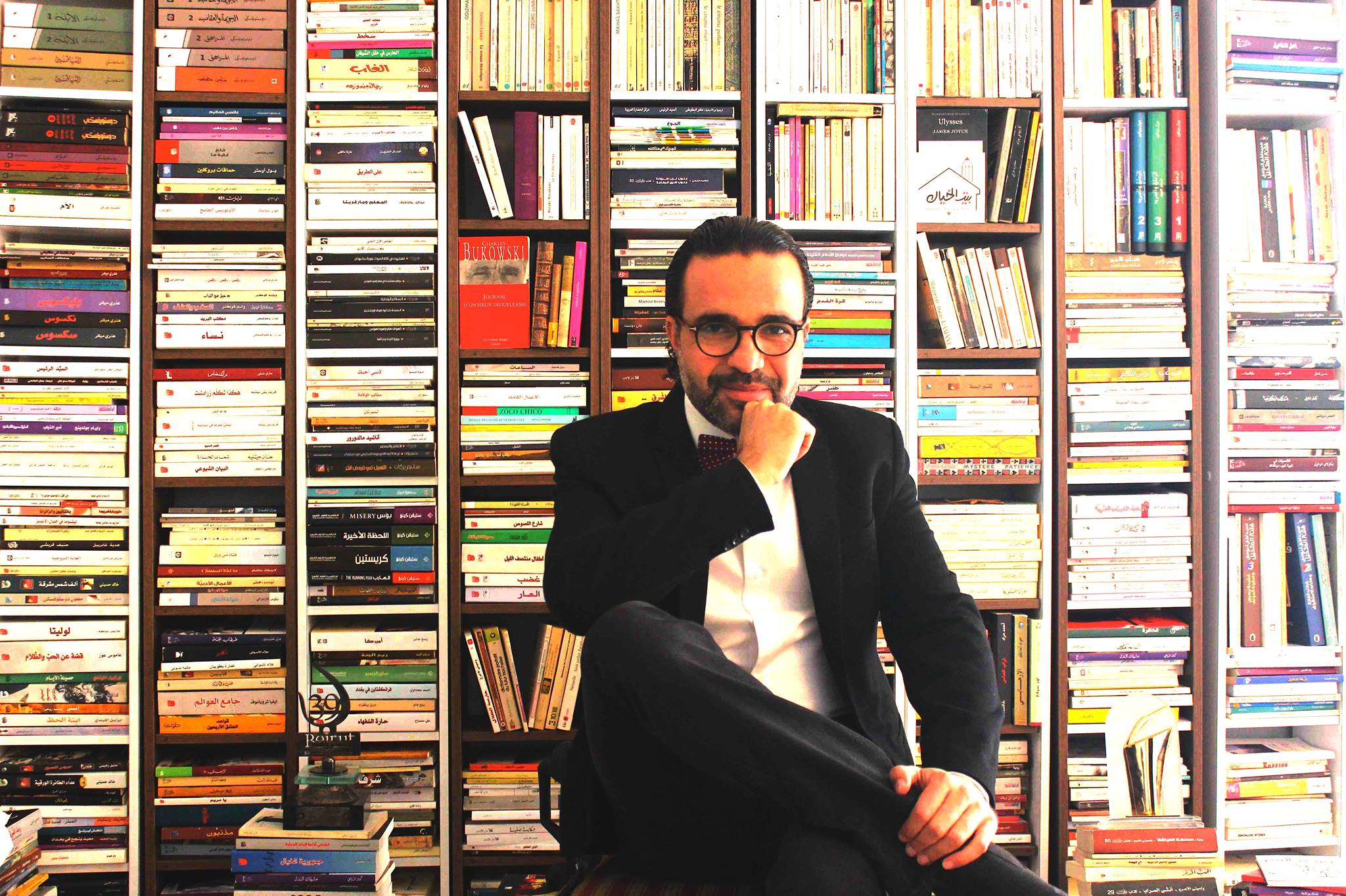 روائي واعلامي ثقافي تونسي